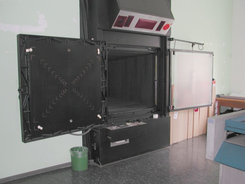 Zweiraumkamera (Dunkelraum) im Landesvermessungsamt von Rheinland Pfalz in Koblenz